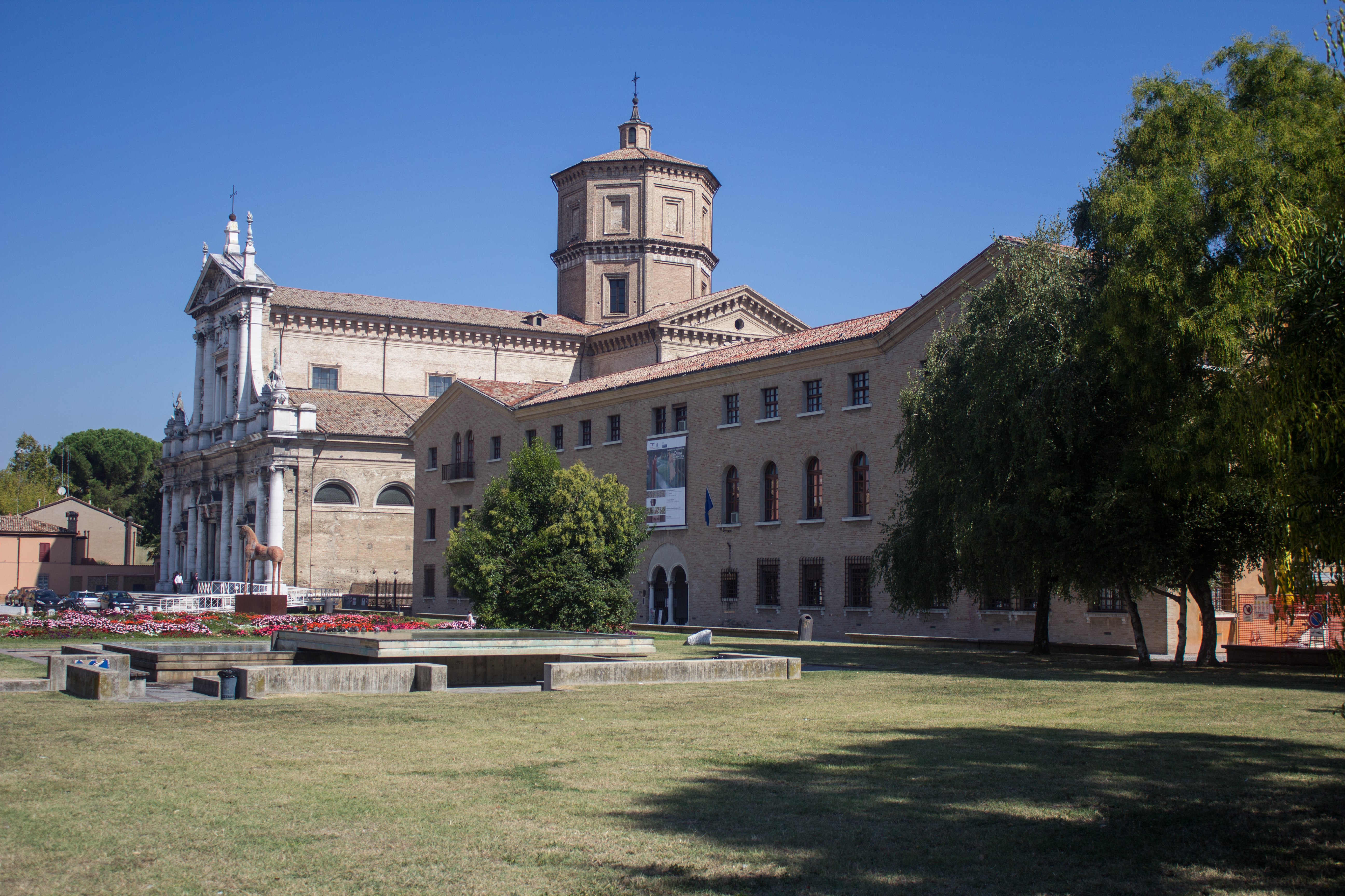 La pinacoteca di Ravenna con sullo sfondo Santa Maria in Porto. This is a photo of a monument which is part of cultural heritage of Italy.